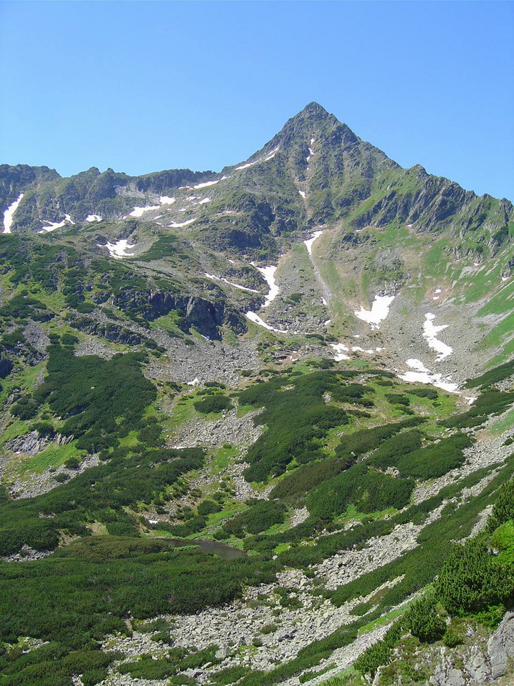 Jahnaci_stit_from_Kopske_sedlo